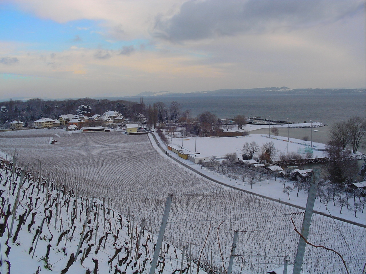 Vue de Cortaillod, avec ses vignes et son port sur le Lac de Neuchâtel --Valentin B. 15:01, 23 February 2007 (UTC)